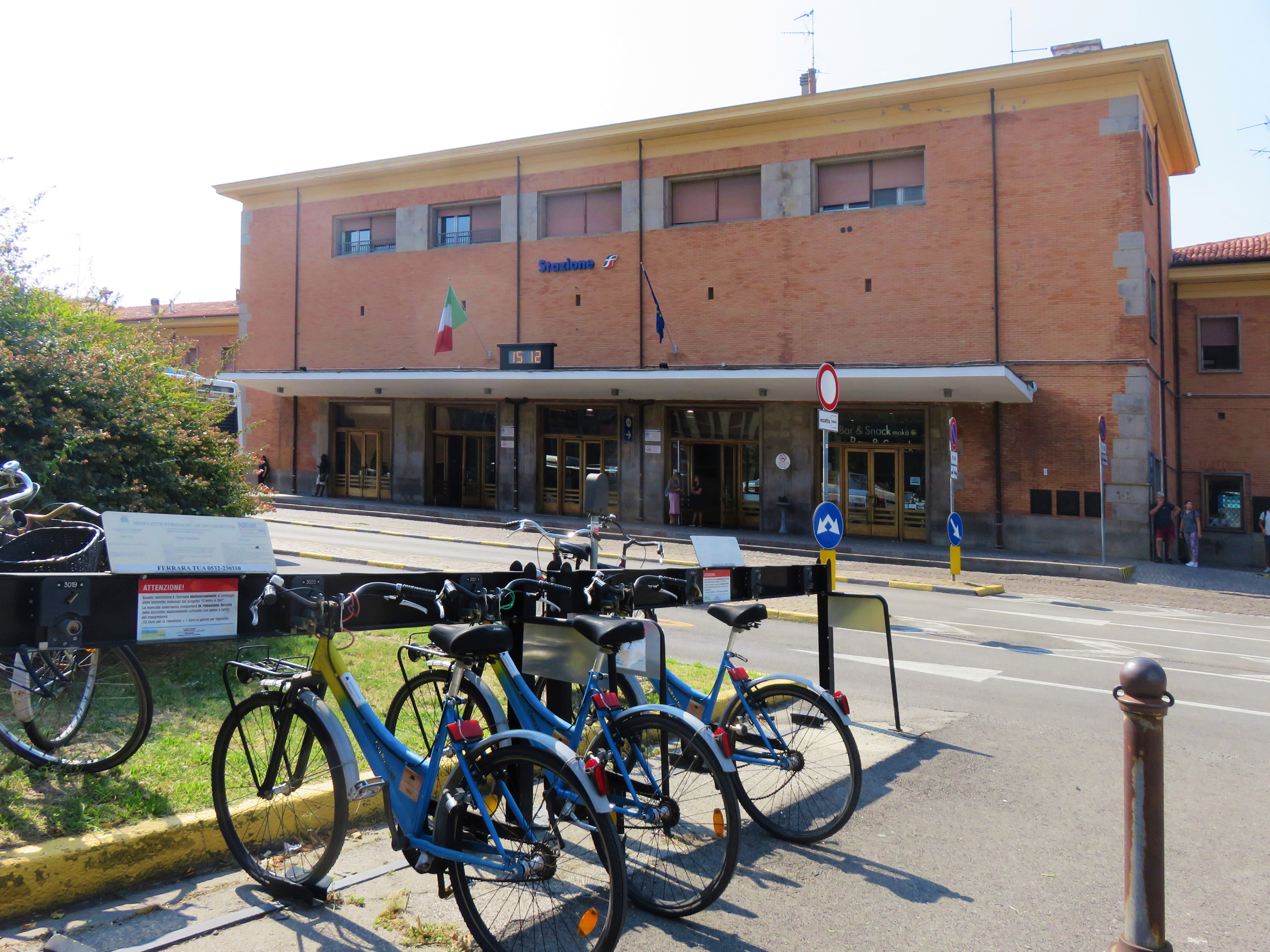 Il piazzale della stazione con un deposito di biclette pubbliche ad uso gratuito di Ferrara TUA